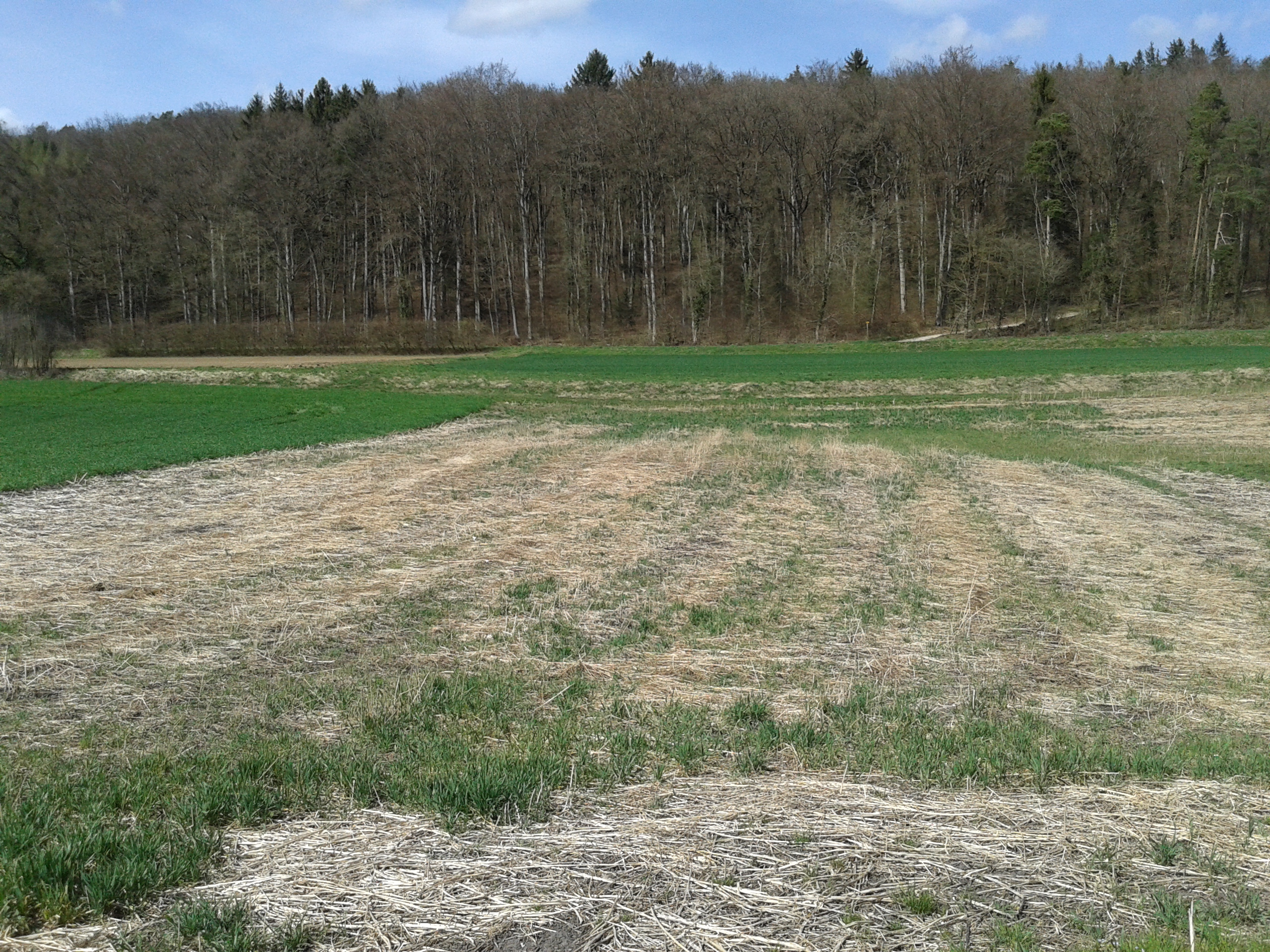 Fundstelle Weier I - III (UNESCO-Welterbe) bei Thayngen, Kanton Schaffhausen, Schweiz